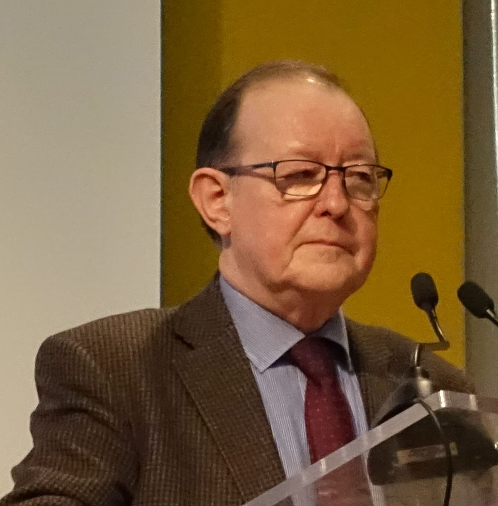 Gérard Raulet en mars 2018 à Bordeaux